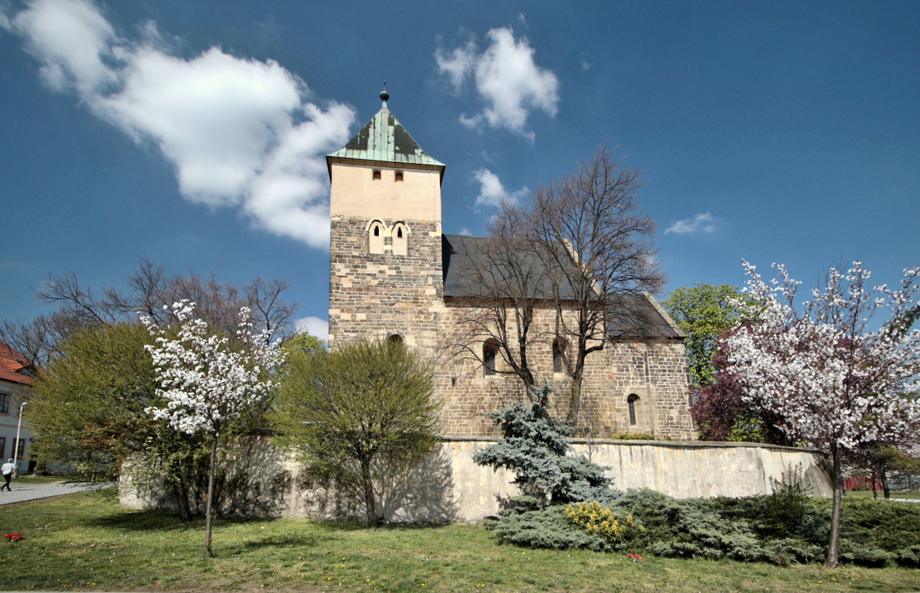 Kyje, kostel svatého Bartoloměje